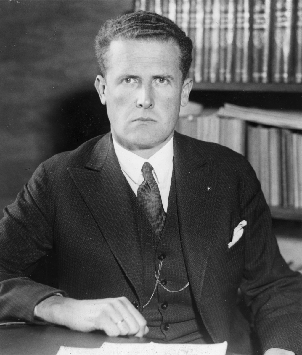 Johan Bernhard Hjort (1895-1969) var en norsk høyesterettsadvokat. Han var grunnlegger og nestleder av det norske fascistpartiet Nasjonal Samling fra 1933. I 1937 brøt han med Quisling og meldte seg ut av partiet. I 1941 ble han arrestert av Gestapo og etter hvert sendt til Tyskland.